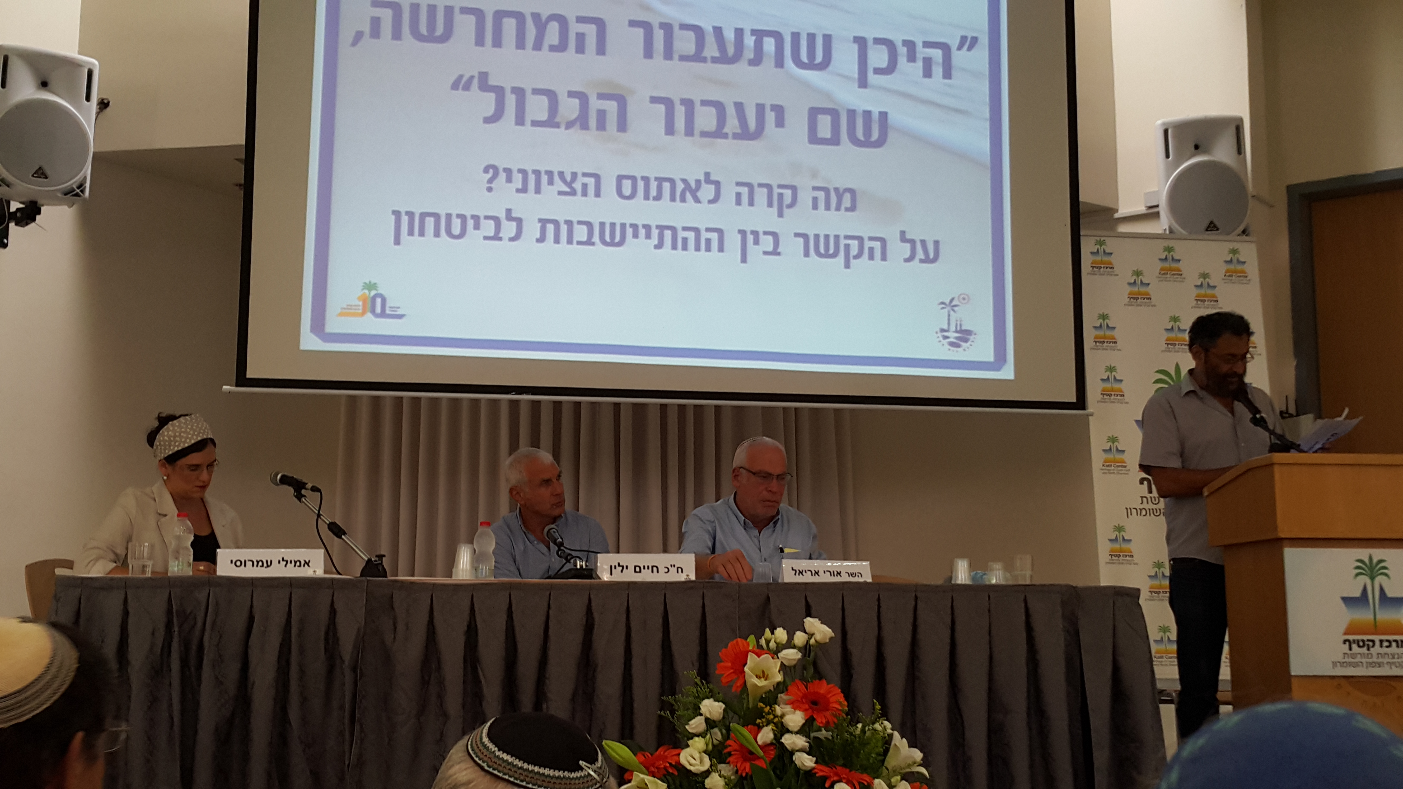 אמילי עמרוסי, חיים ילין, אורי אריאל ויאיר פרג'ון